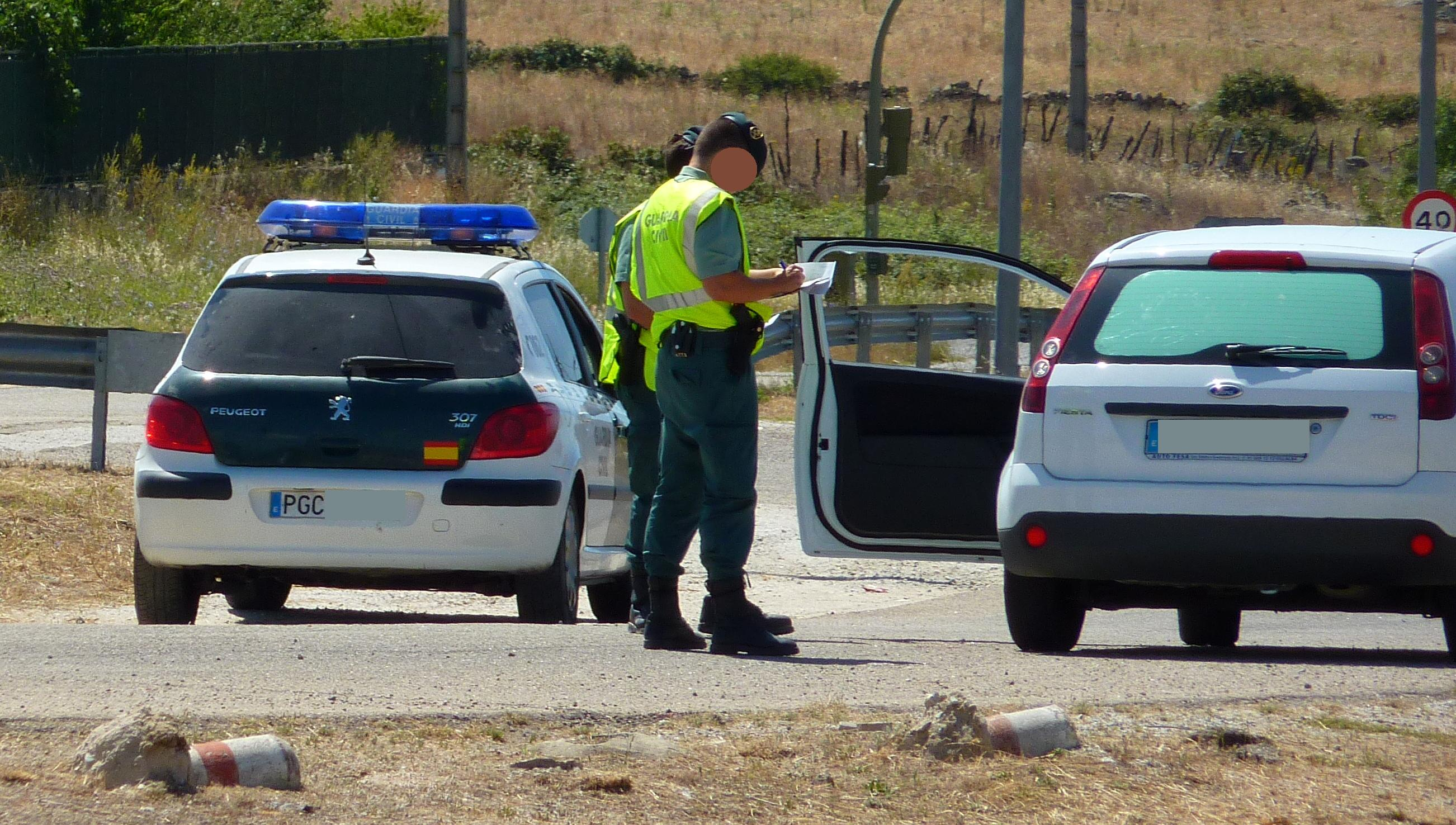 Peugeot 307 de la Guardia Civil.